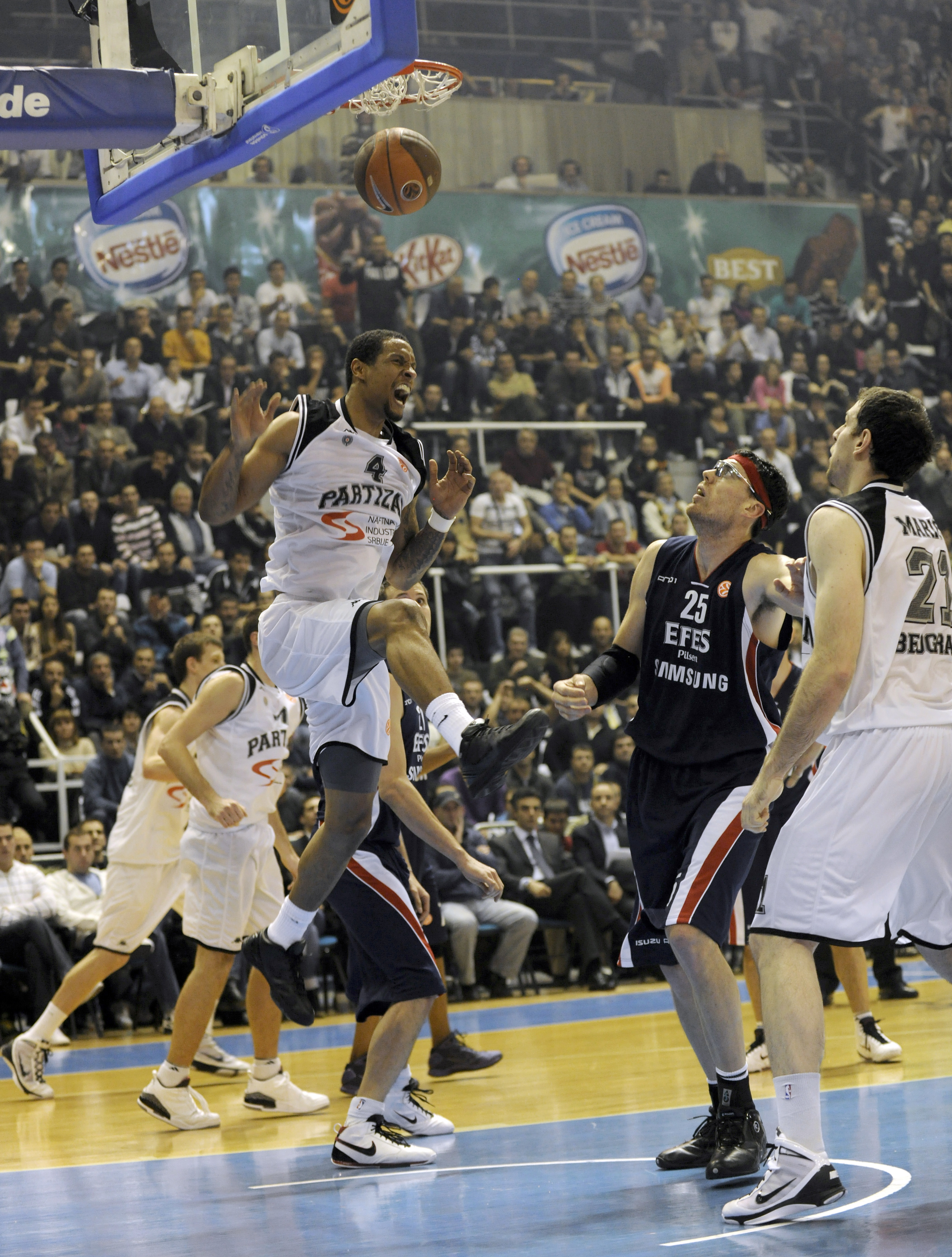 _DSC8045